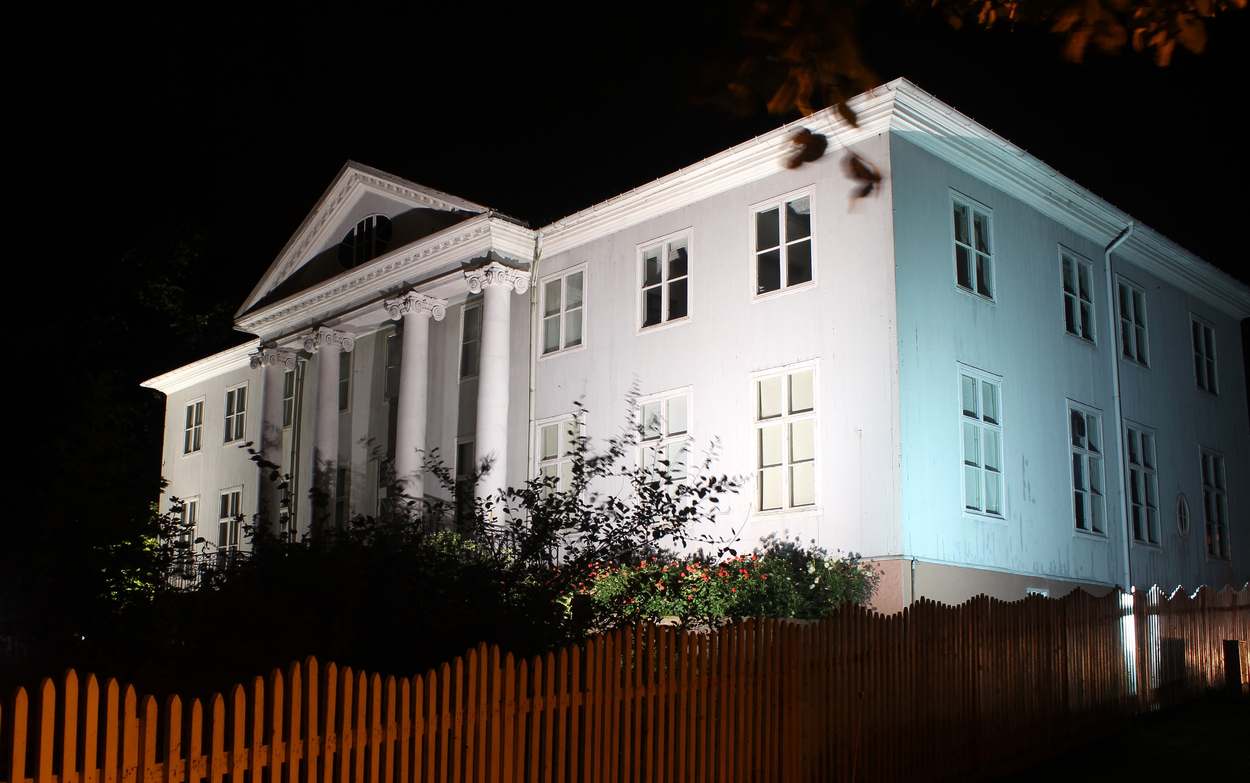 Austad gård er en herregård i Drammen og har fra 1964 vært en del av Drammens Museum. Austad gård og hage er et fredet kulturminne. Foto tatt fra posisjonen: N59³43'49" E010³12'20" (WGS84).